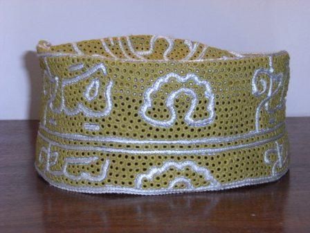 Photo prise à l'hotel